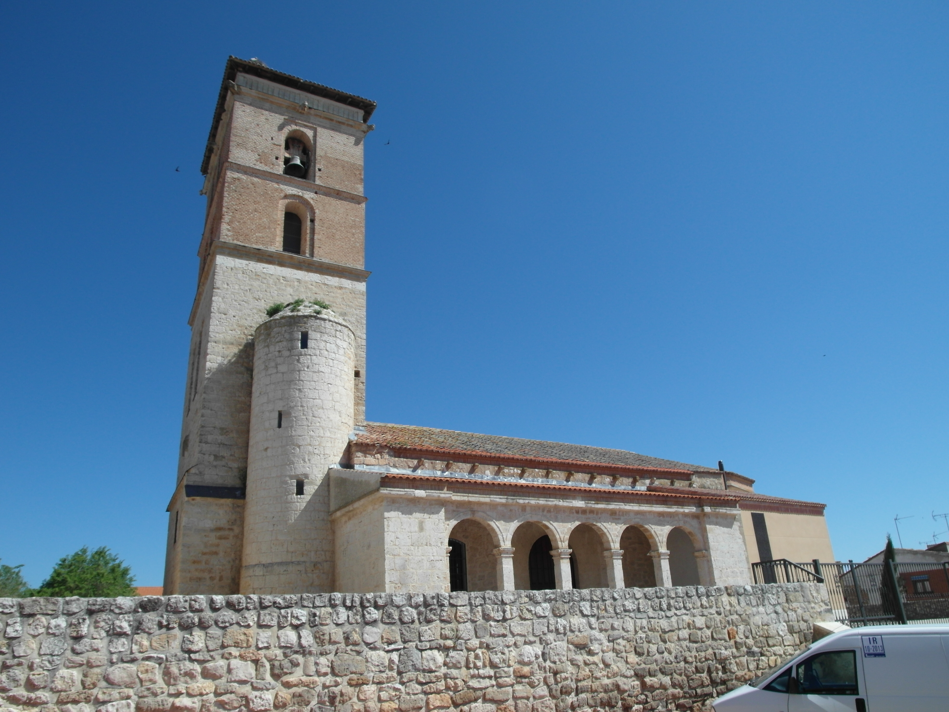 Fuensaldaña, Valladolid.